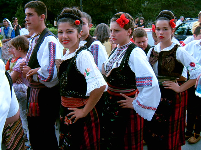 Српски представници на фестивалу Илинденски денови, Битољ. Дефиле 2006.